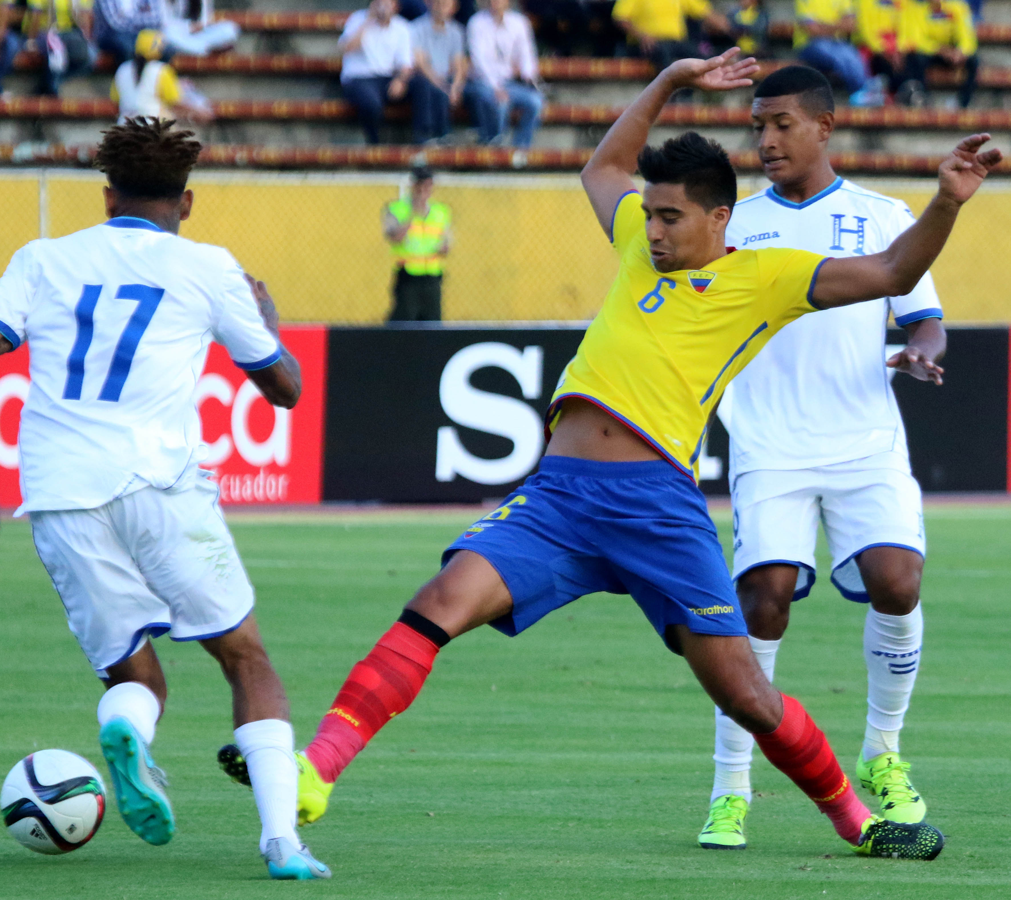 Quito, 08 de sept. (Andes).-Ecuador enfrenta a Honduras en partido amistoso jugado en el estadio Olimpico Atahualpa. En la gráfica Cristian Noboa (6) de Ecuador, disputa el balón con Henry Figueroa (17) de Honduras. Foto:César Muñoz/Andes